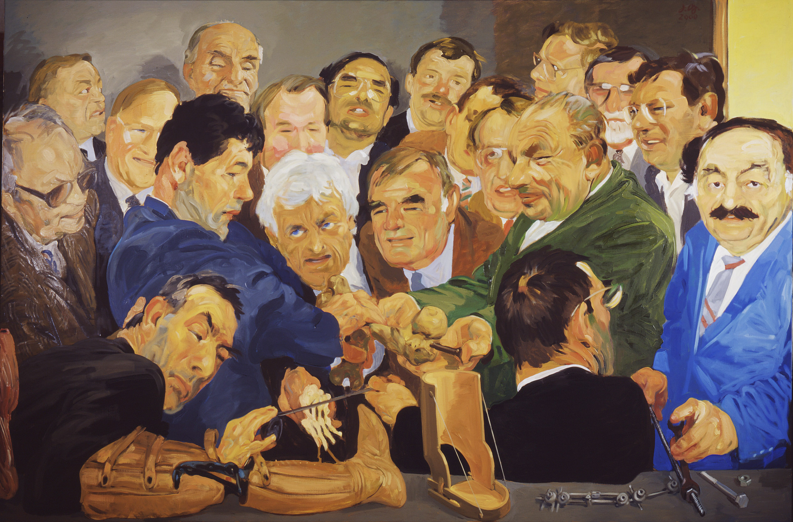 Ausschnitt aus dem Wandbild im Hörsaal des Berufsgenossenschaftlichen Unfallkrankenhauses Hamburg: „Aus der Geschichte der Unfallchirurgie“. Unter den dargestellten Unfallchirurgen sind Gerhard Küntscher (im grünen Jacket) und Gawriil Abramowitsch Ilisarow (ganz rechts